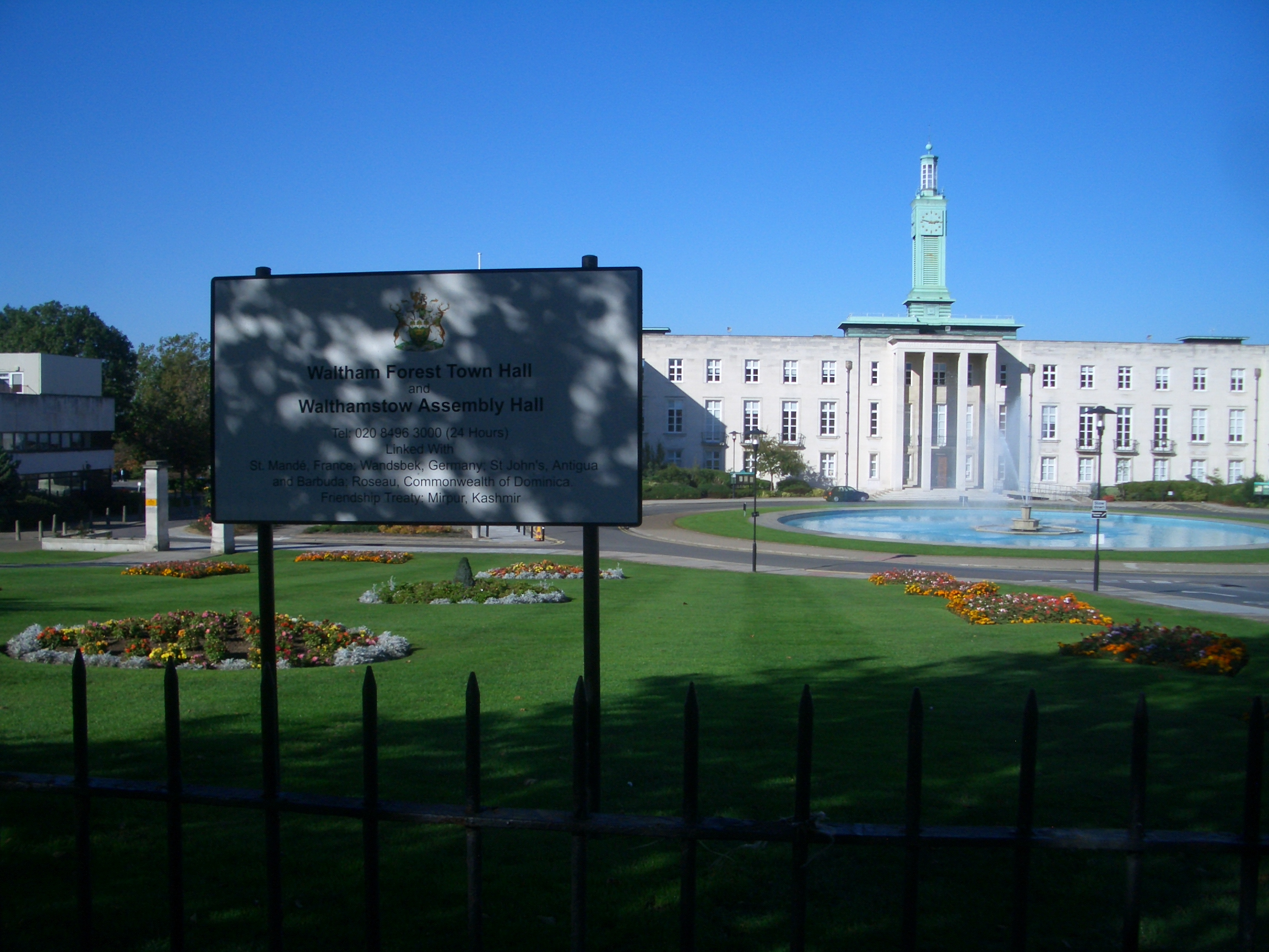 Walthams Forest Council mit Schild über verschwisterte Gemeinden